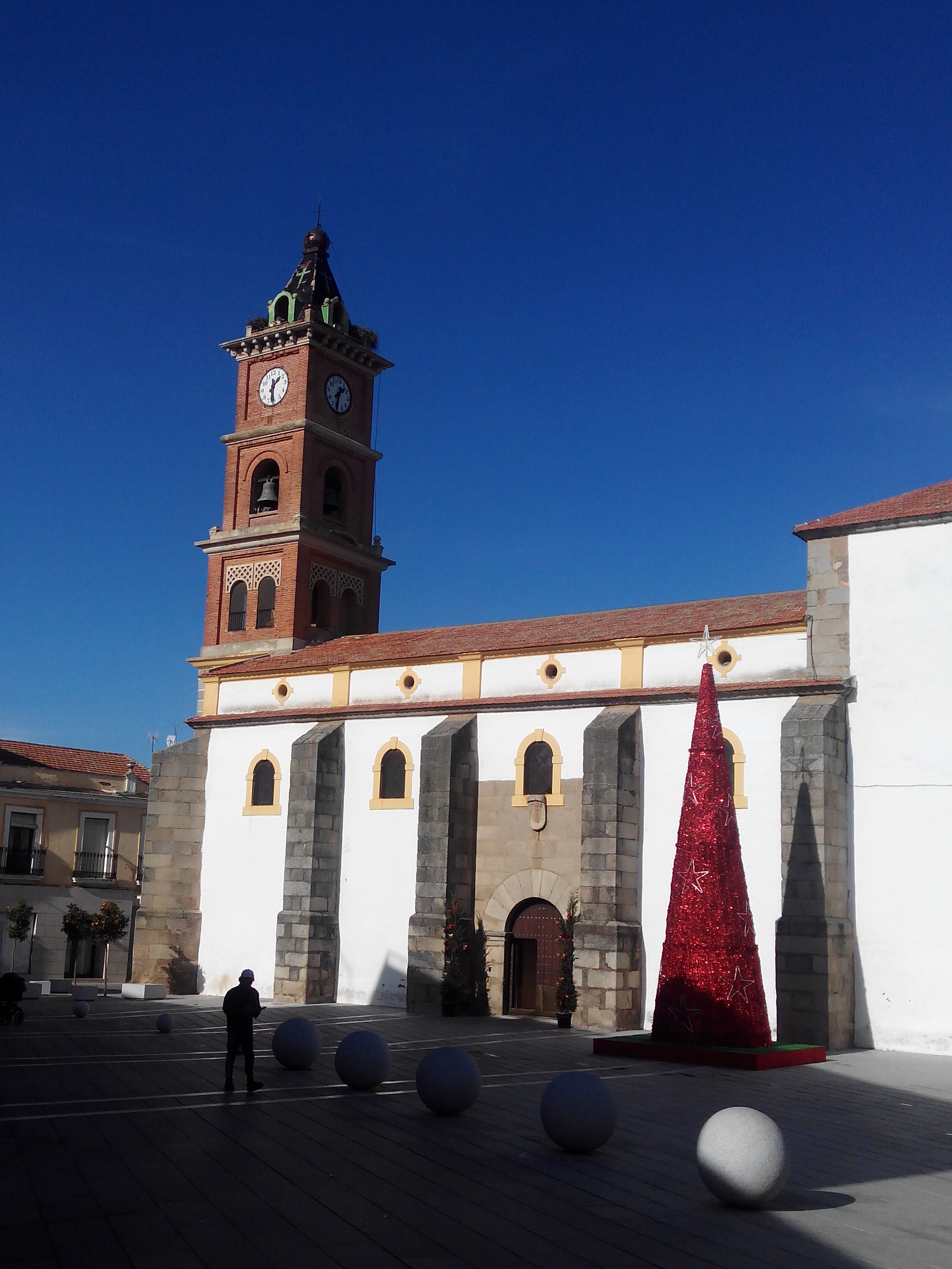 fotografía de la iglesia de Nuestra Señora de los Milagros Quintana de la Serena